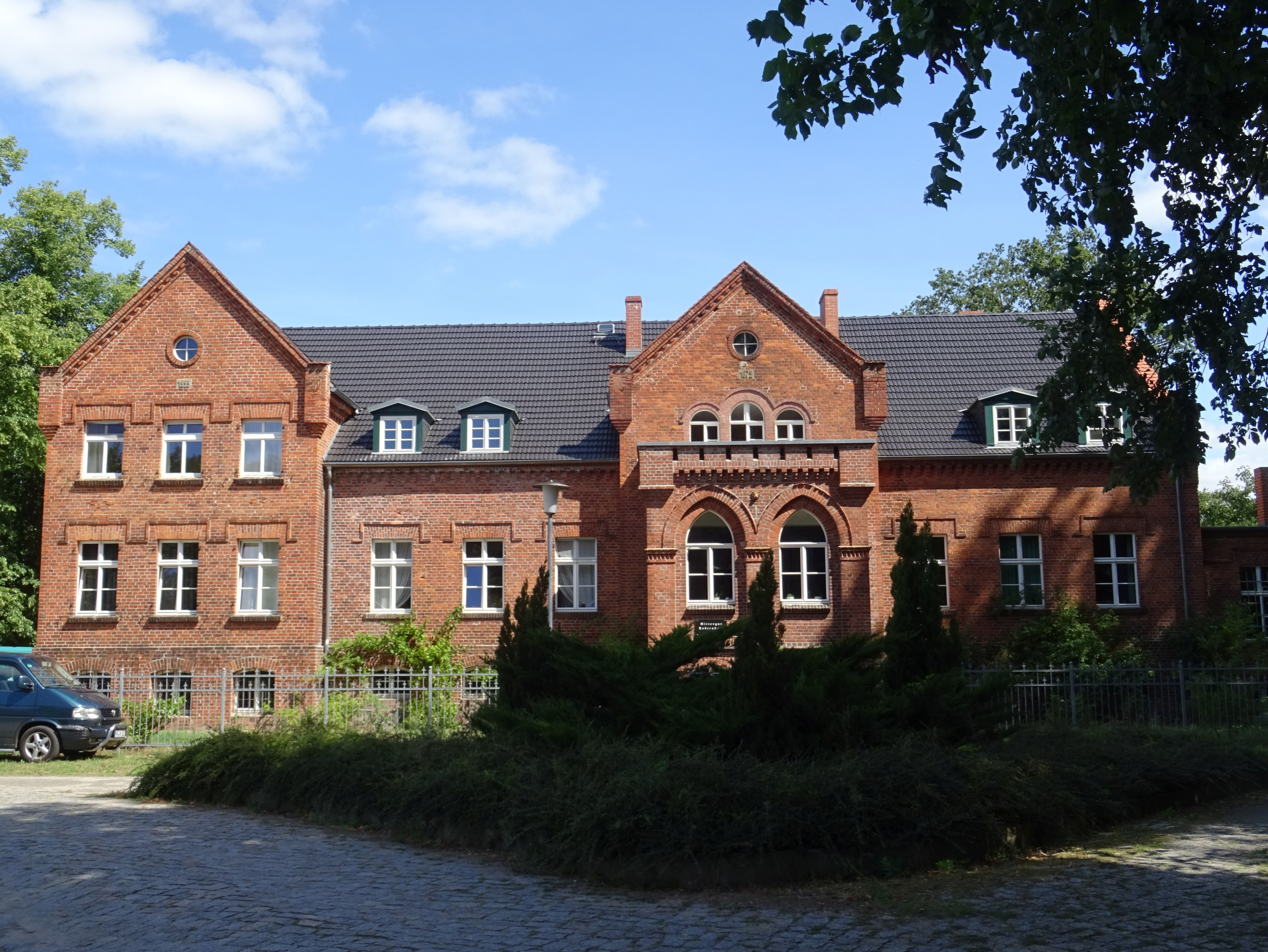 Waldfrieden (Stadt Havelberg), Gutshaus Teil des denkmalgeschützten Ensembles